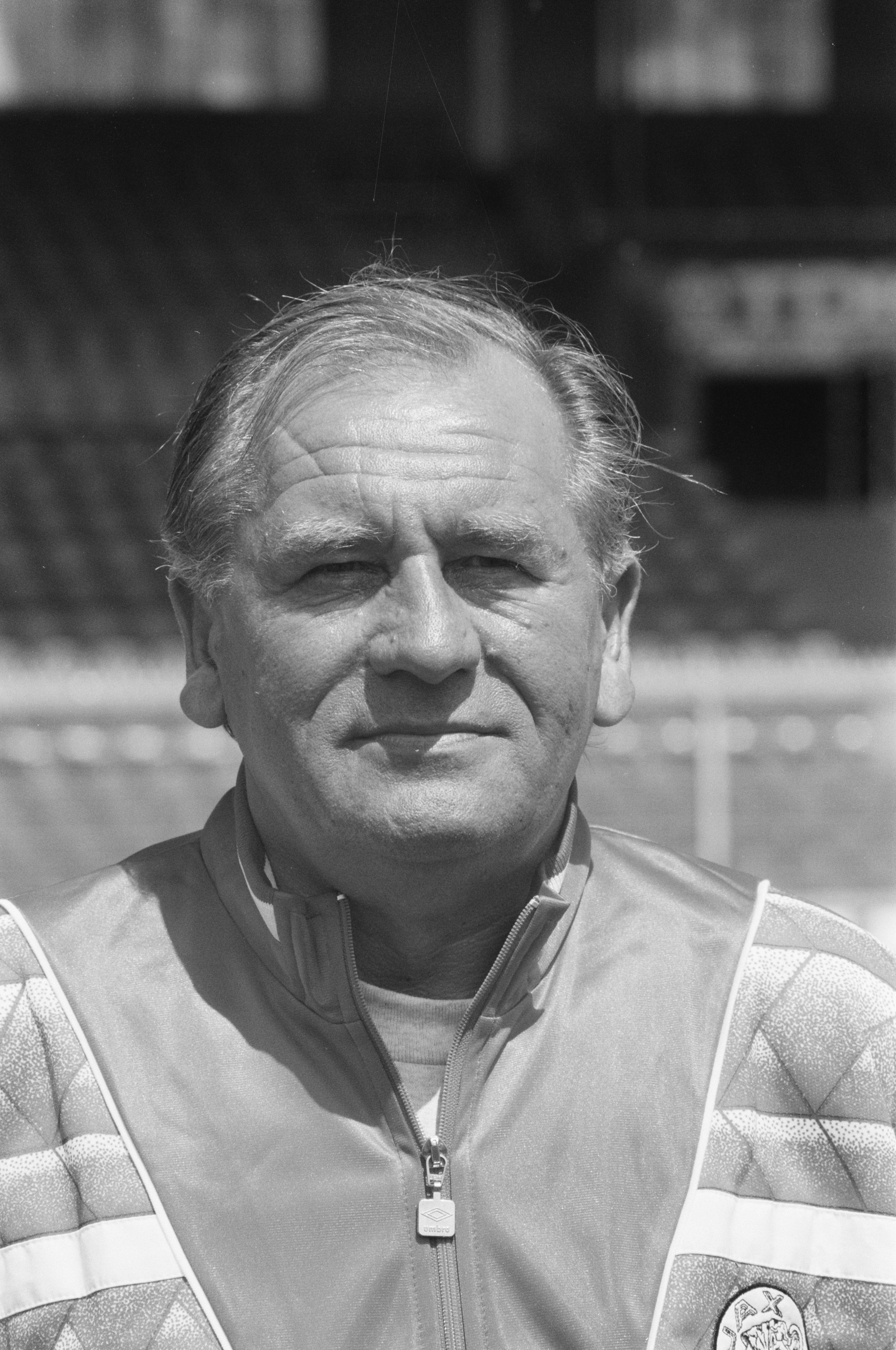 Collectie / Archief : Fotocollectie Anefo Reportage / Serie : Persdag Ajax Beschrijving : Trainer Bobby Haarms Annotatie : nr. 19, 20: Bobby Haarms, 21, 22: Spitz Kohn Datum : 3 juli 1989 Locatie : Amsterdam, Noord-Holland Trefwoorden : portretten, sport, trainers, voetbal Persoonsnaam : Haarms, Bobby, Kohn, Spitz Fotograaf : Croes, Rob C. / Anefo Auteursrechthebbende : Nationaal Archief Materiaalsoort : Negatief (zwart/wit) Nummer archiefinventaris : bekijk toegang 2.24.01.05 Bestanddeelnummer : 934-4794